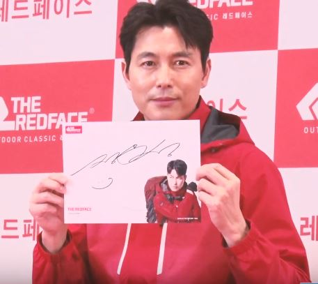 배우 정우성이 23일 오후 서울 강서구 강서로의 한 백화점에서 열린 포토행사에 참석했다.